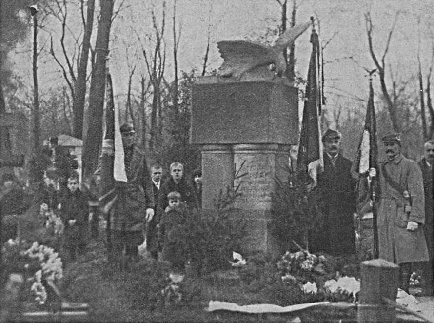 Poświęcenie nagrobka Stanisława Biegi na Cmentarzu Powązkowskim w Warszawie 25 listopada 1928.